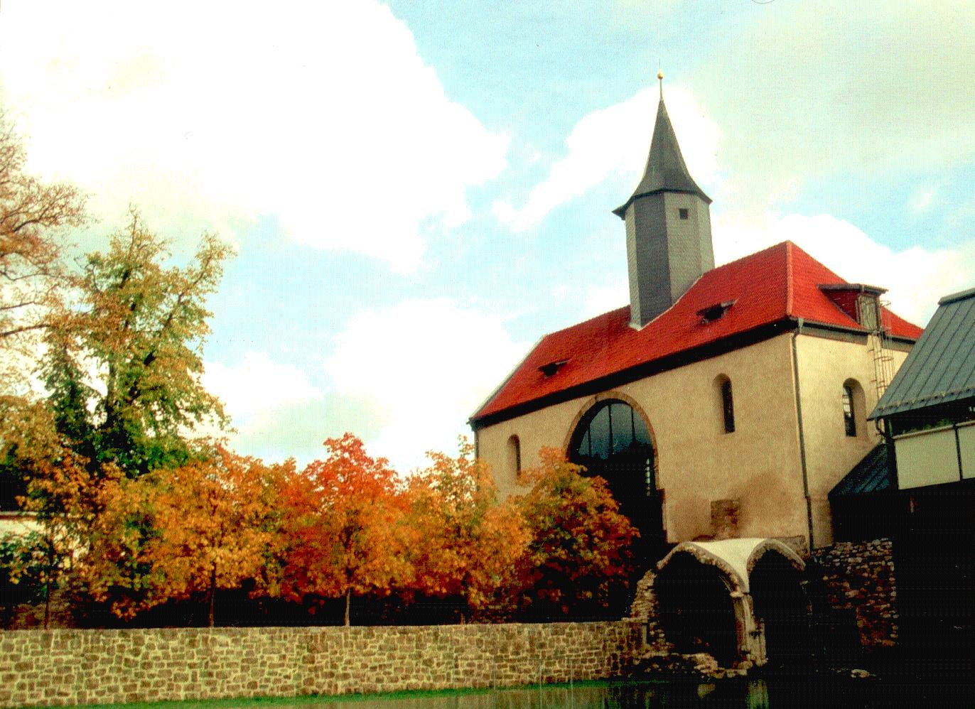 Die von Grund auf sanierte und umgebaute Klosterkirche von Volkenroda. Ehemals Ruine, heute eines der Erkennungszeichen des aufblühenden Ortes. Westfassade mit Ahornallee. Eigene Fotografie im November 2006.